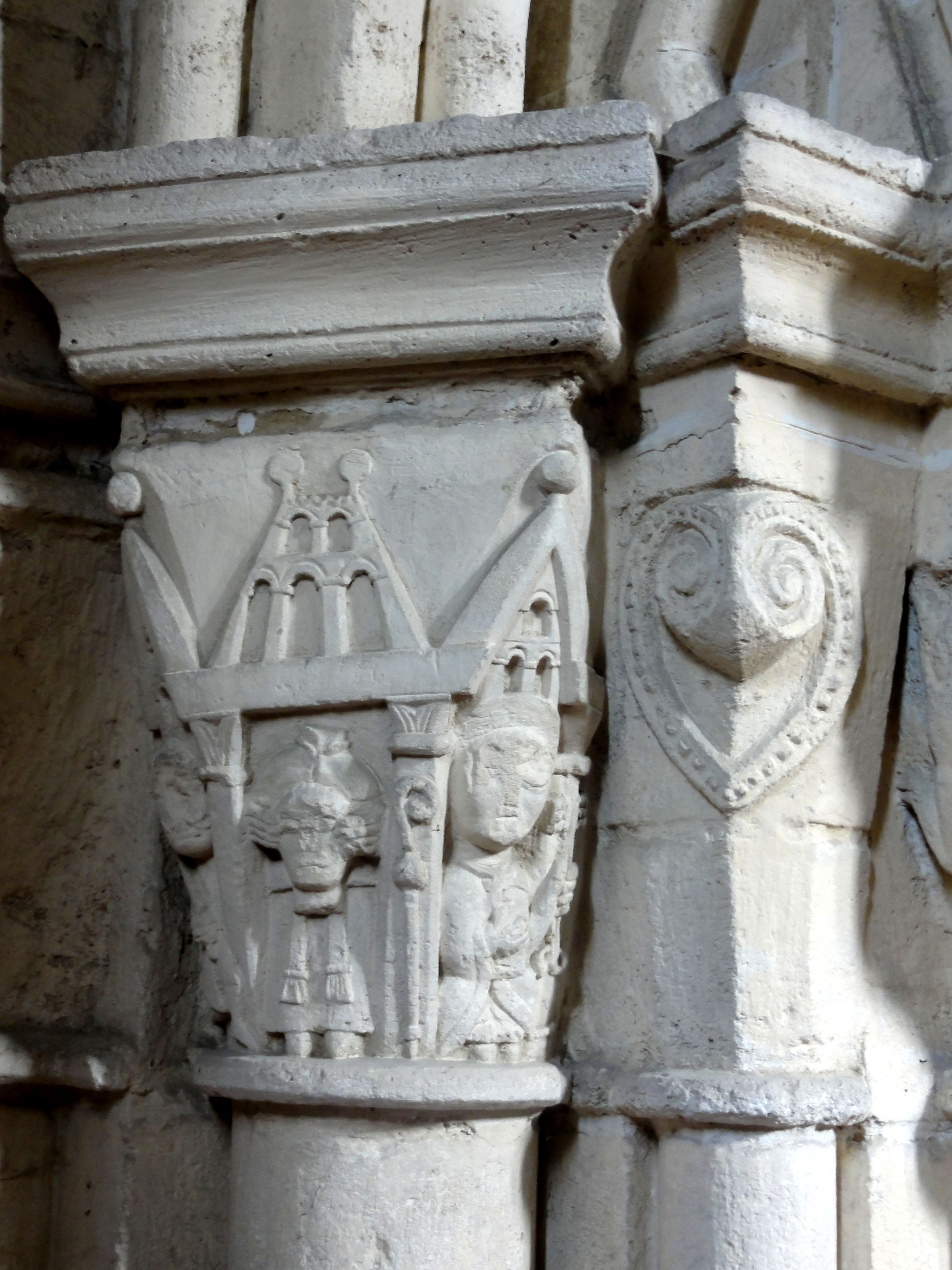 Chapiteaux du 2e pilier au nord.